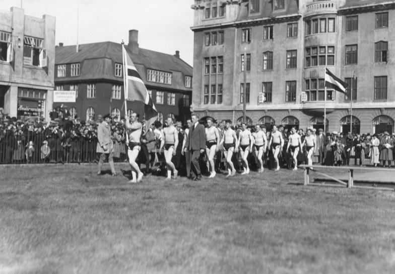 Polarfahrt mit dem Dampfer "München".- Isländische Ringkämpfe 17. Juli - 12. August 1925